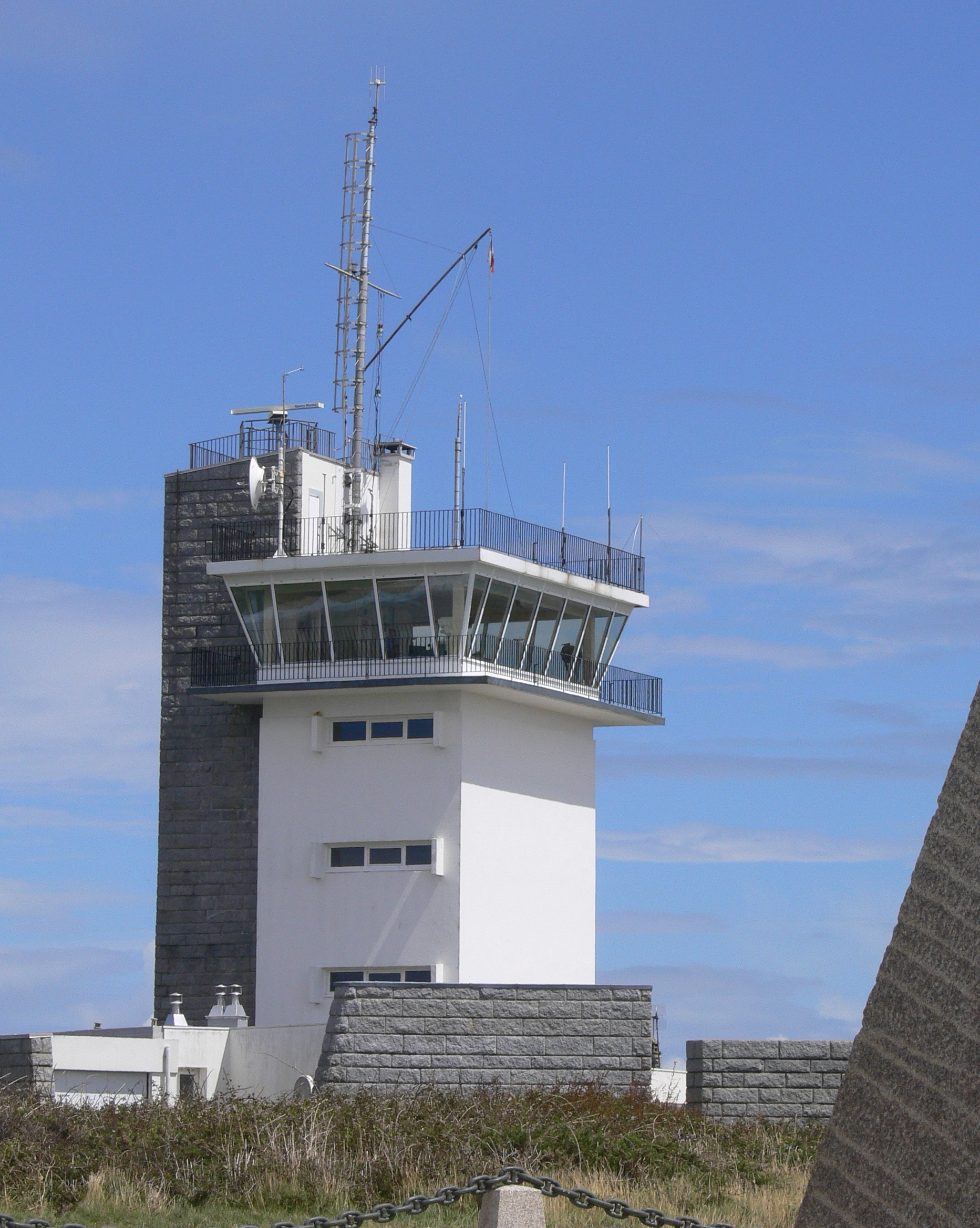 Sémaphore (Marine Nationale) du "Cap de la Chèvre" (ou "Beg Penn ar Roz" en Breton, sur la Presqu'île de Crozon, dans le Finistère, en Bretagne, dans l'Ouest de la France), avancée rocheuse supportant une zone de terre de bruyère fortement exposée au vent, soleil (et embruns lors des tempêtes)